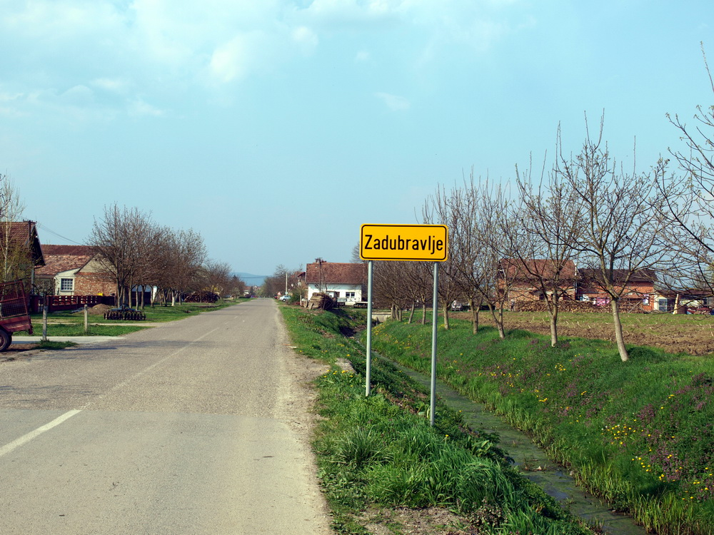 Ulaz u selo Zadubravlje, Brodsko-posavska županija.